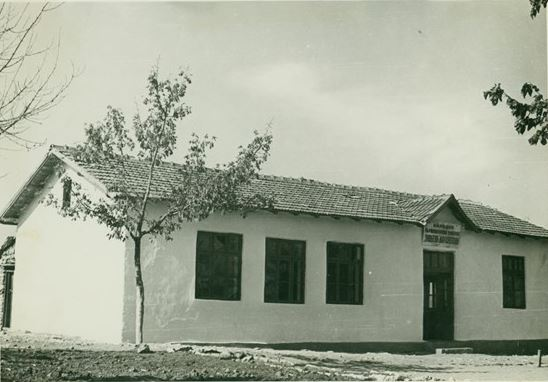 Начално училище „Любен Каравелов“ в село Граничар, Добричко.